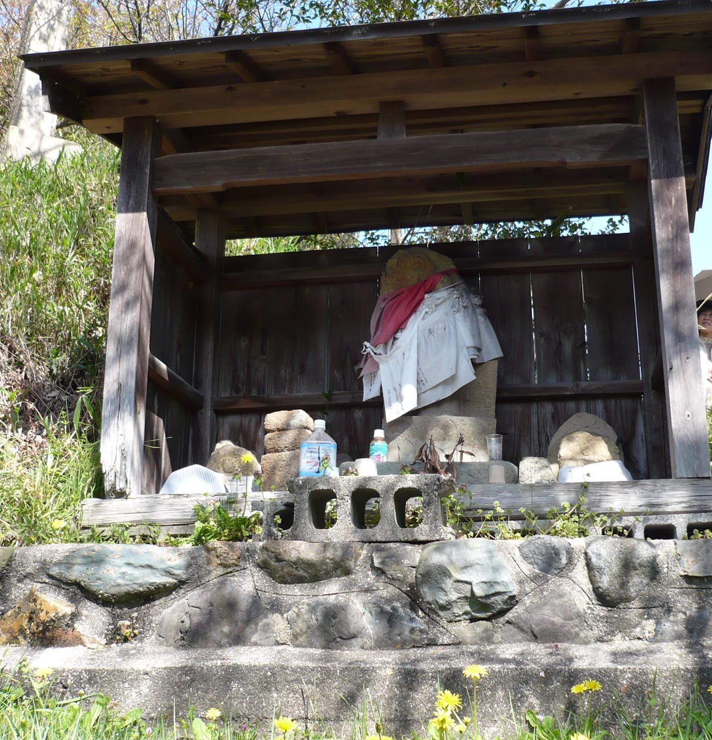 登山道入り口付近の地蔵